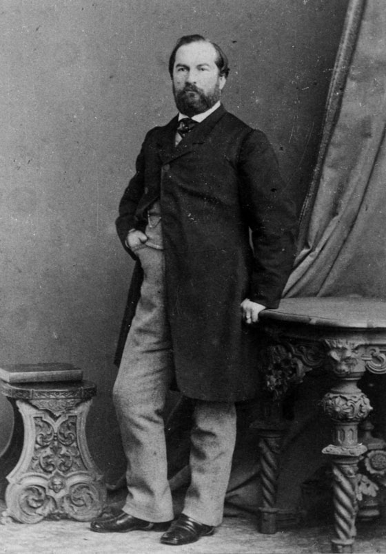 Antonio Caccianiga (1823-1909), sindaco di Maserada e di Treviso, deputato del Regno d’Italia, presidente del consiglio provinciale di Treviso.